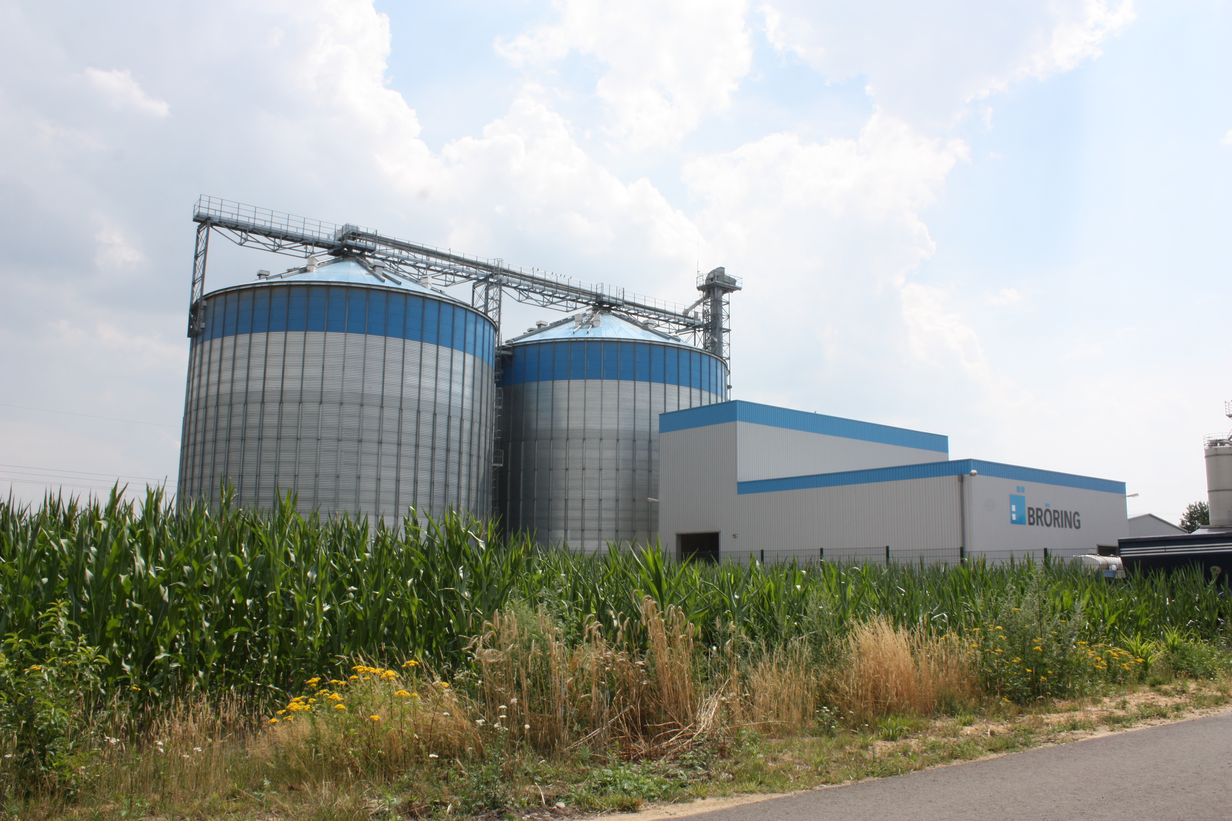 Barnstorf, Landkreis Diepholz, Niedersachsen; Firma Bröring in Barnstorf: Futtermittelproduktion und im Agrarhandel